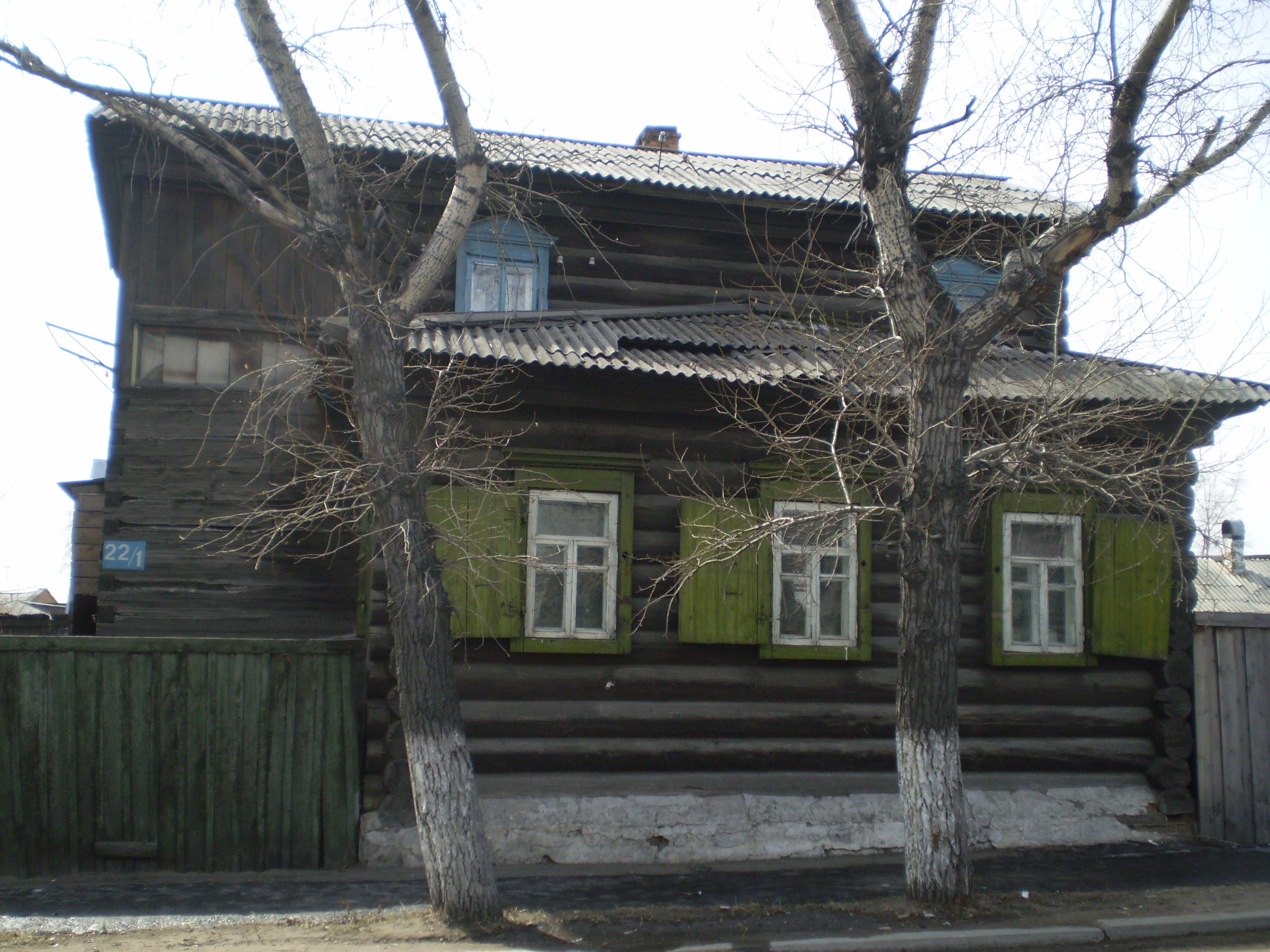 Ул. Банзарова 22. Усадьба И. И. Овсянкина. 1820-е.